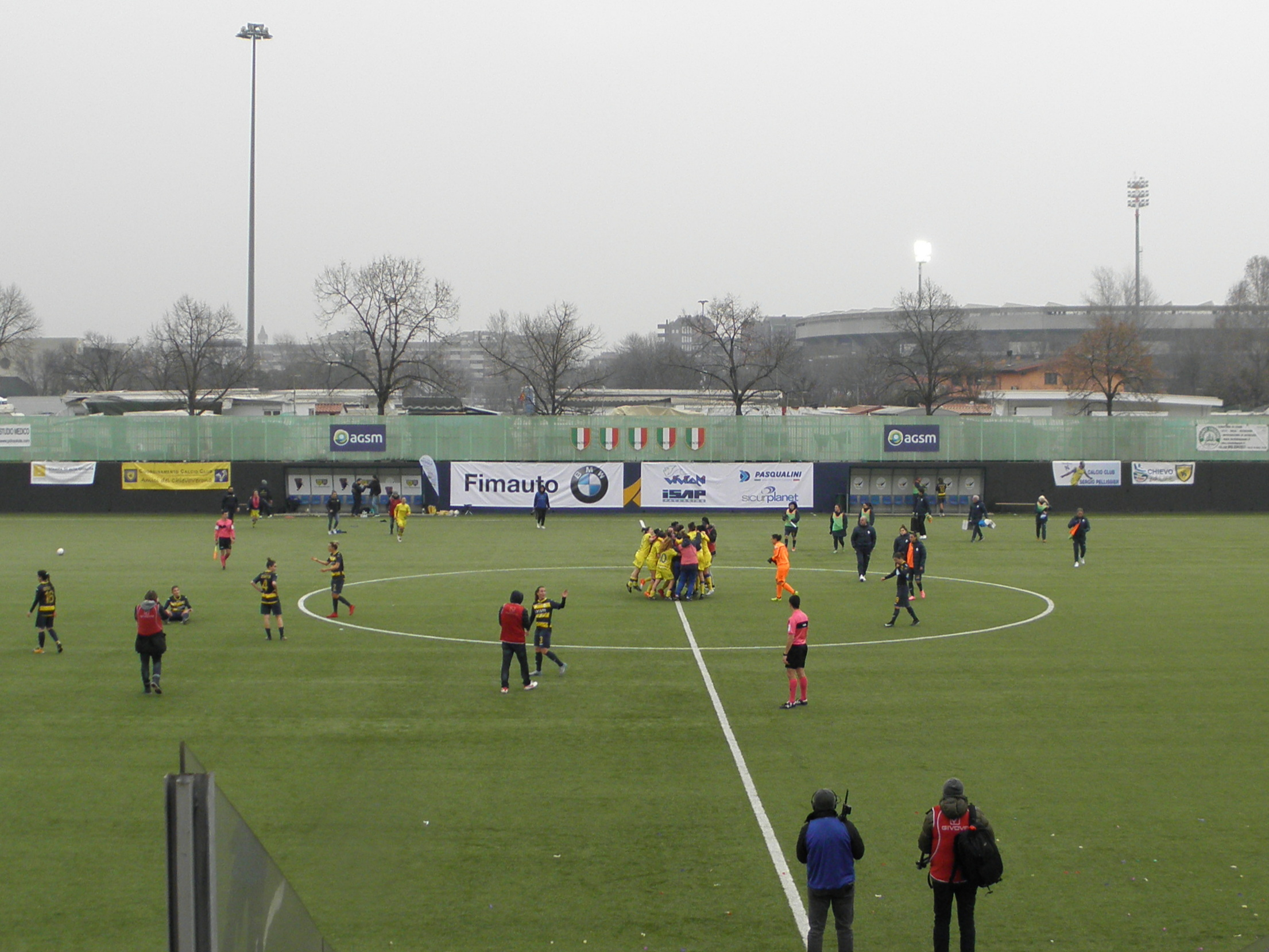 Verona, Stadio Aldo Olivieri: festeggiamenti alla fine del derby vinto dal Fimauto Valpolicella sull'AGSM Verona del 17 febbraio 2018.